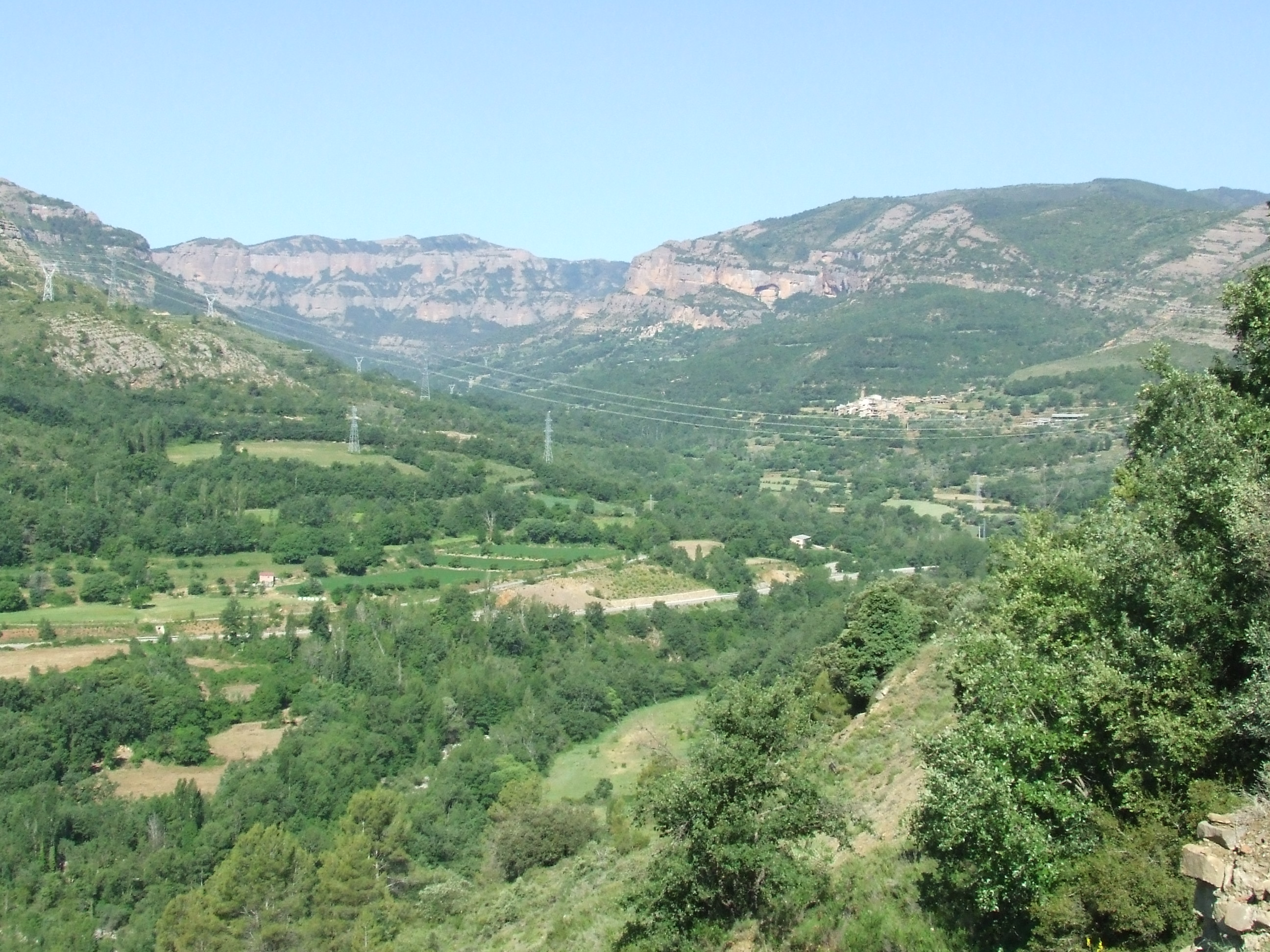 El Serrat del Ban des del capdavall de la vall del riu de Serradell (Toralla i Serradell, Pallars Jussà)